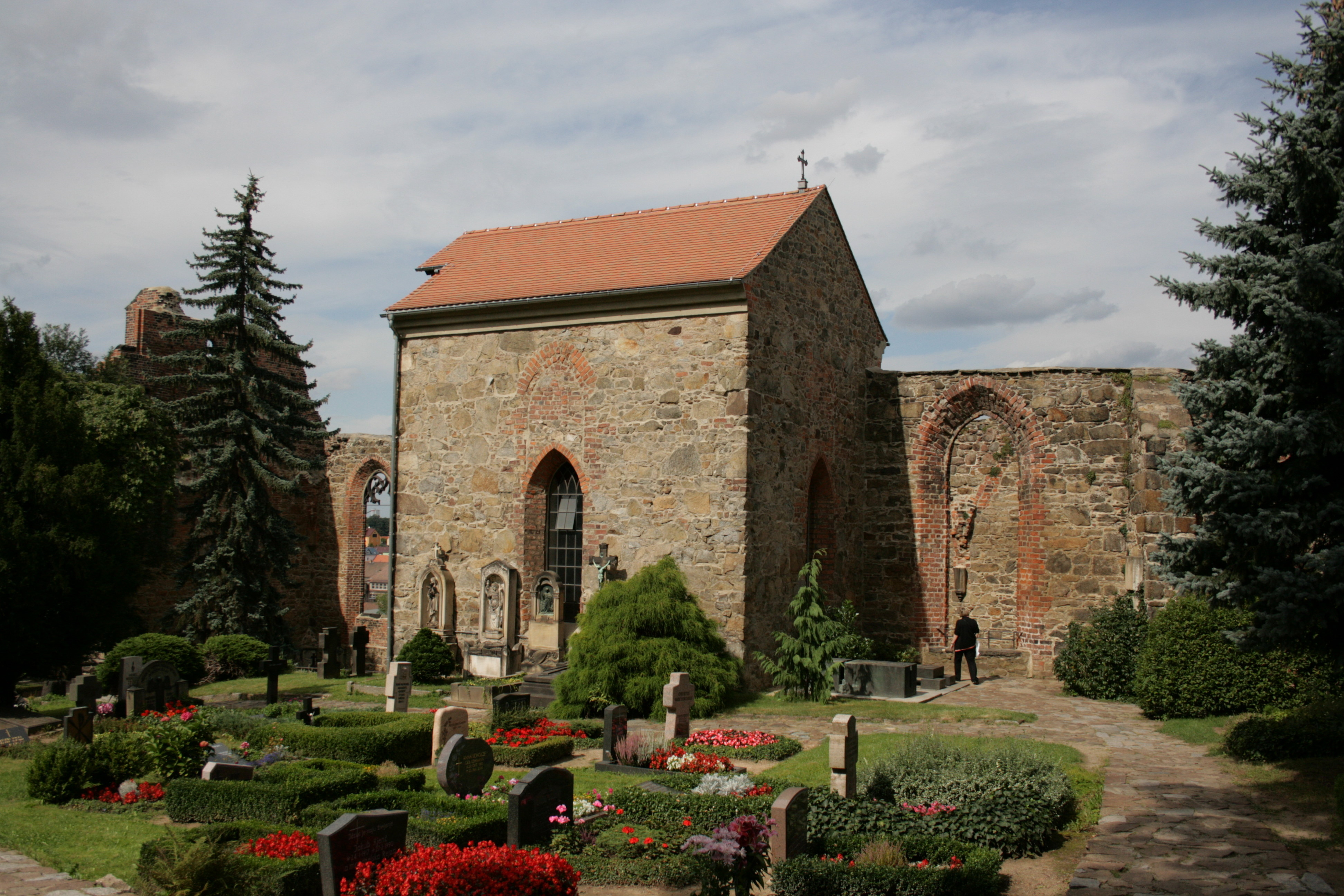 Nikolaikirche und -friedhof in Bautzen Hornjoserbsce: Na Mikławšku w Budyšinje.